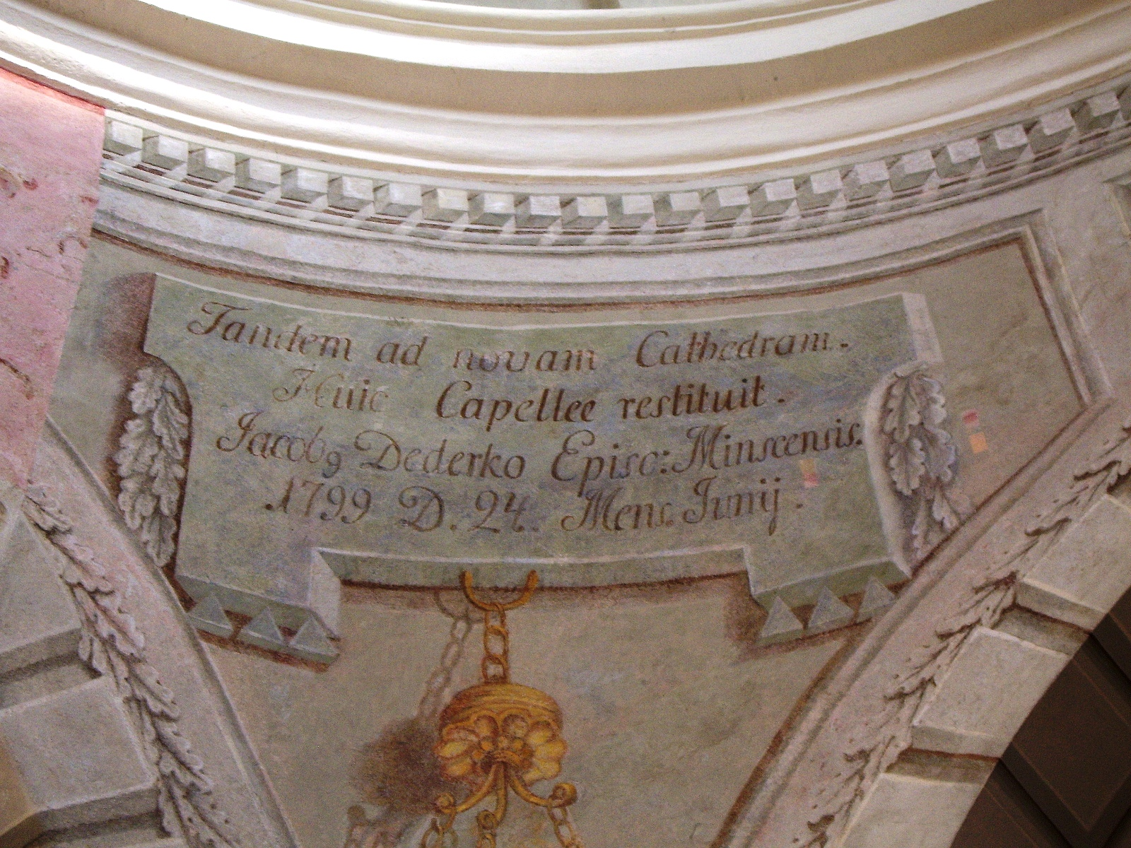 Odsłonięta inskrypcja biskupa Jakuba Dederko w kaplicy św. Felicjana w katedrze mińskiej